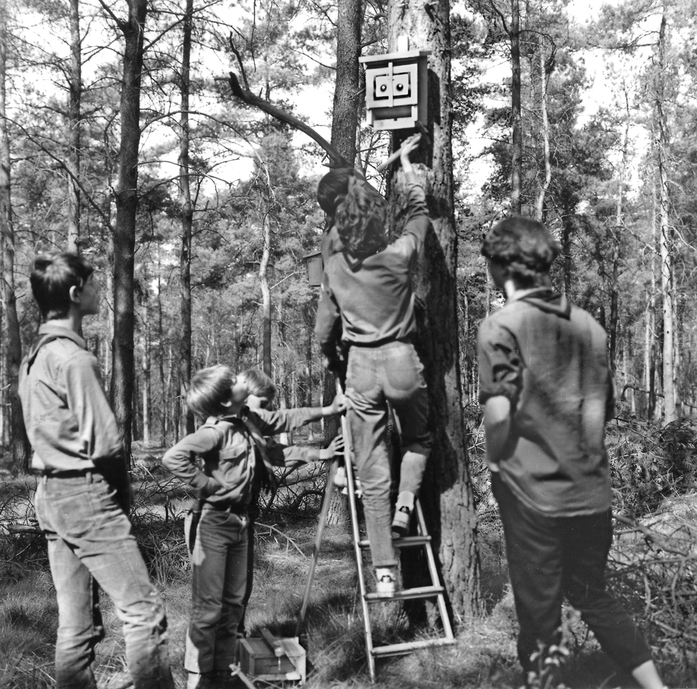 Waldjugend-Mitglieder befestigen einen Fledermaus-Wiederansiedlungskasten im Kaldenkircher Grenzwald